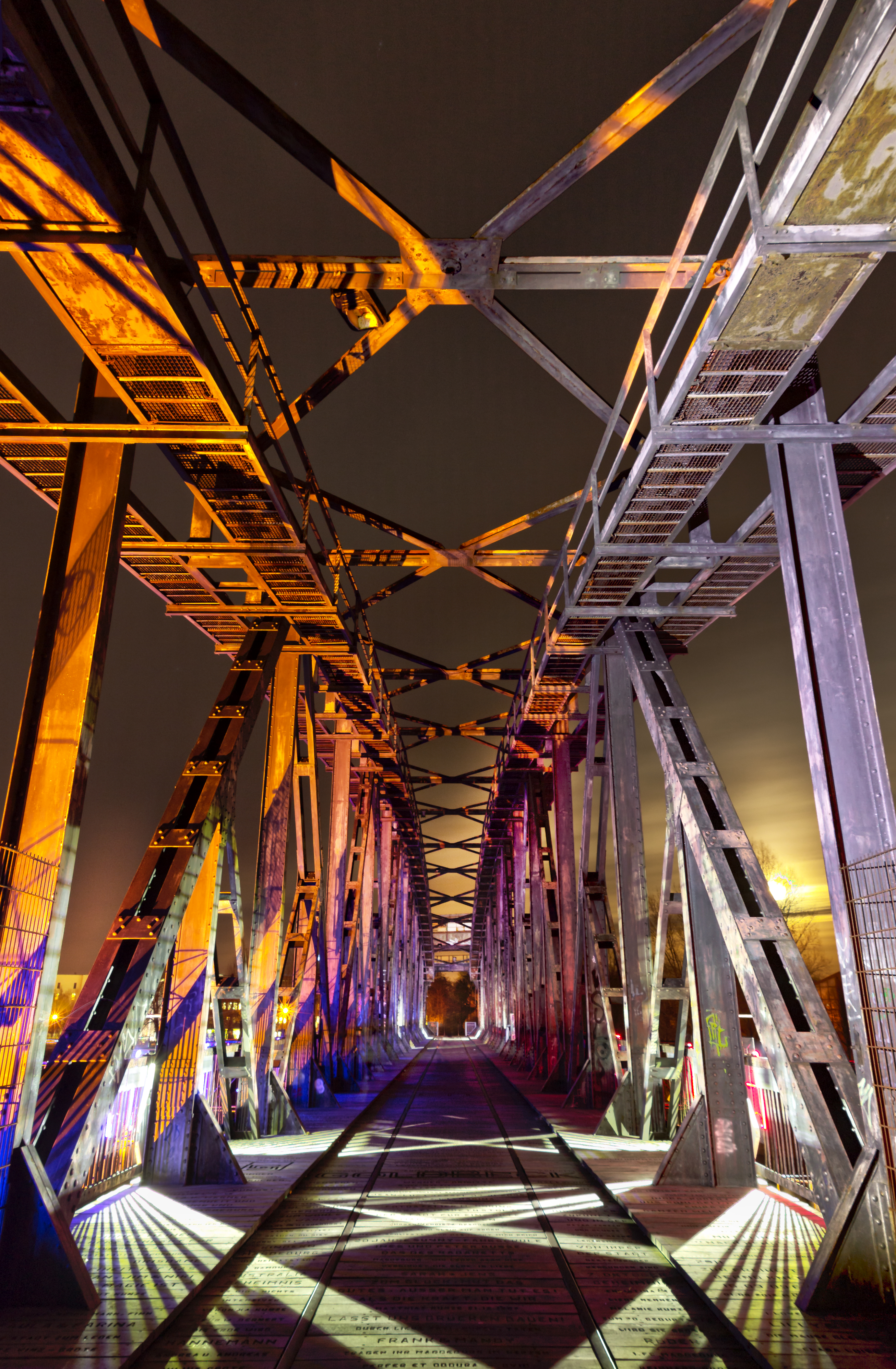 Hubbrücke Magdeburg